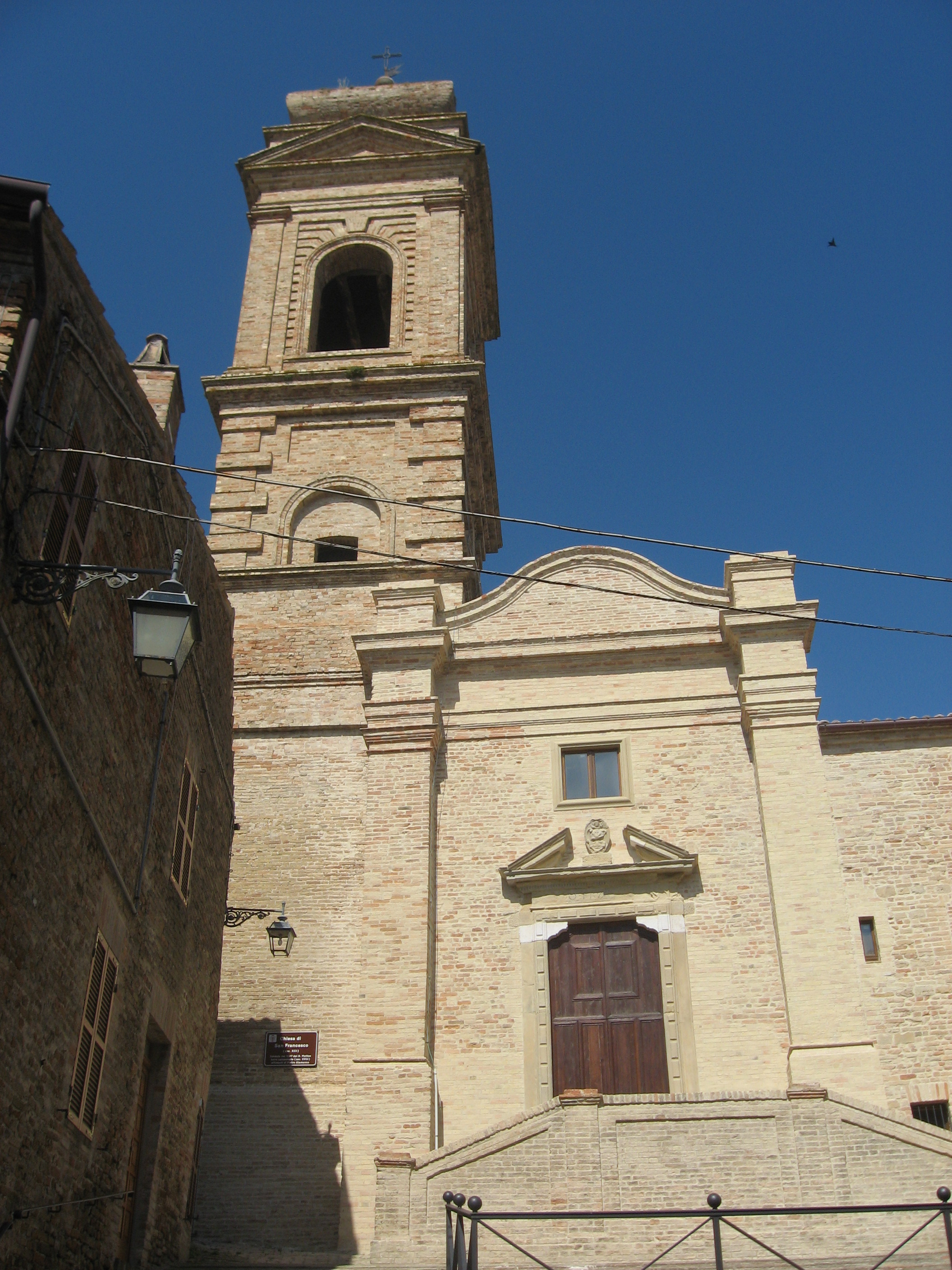 Monterubbiano, chiesa di San Francesco. Data: giugno 2007.